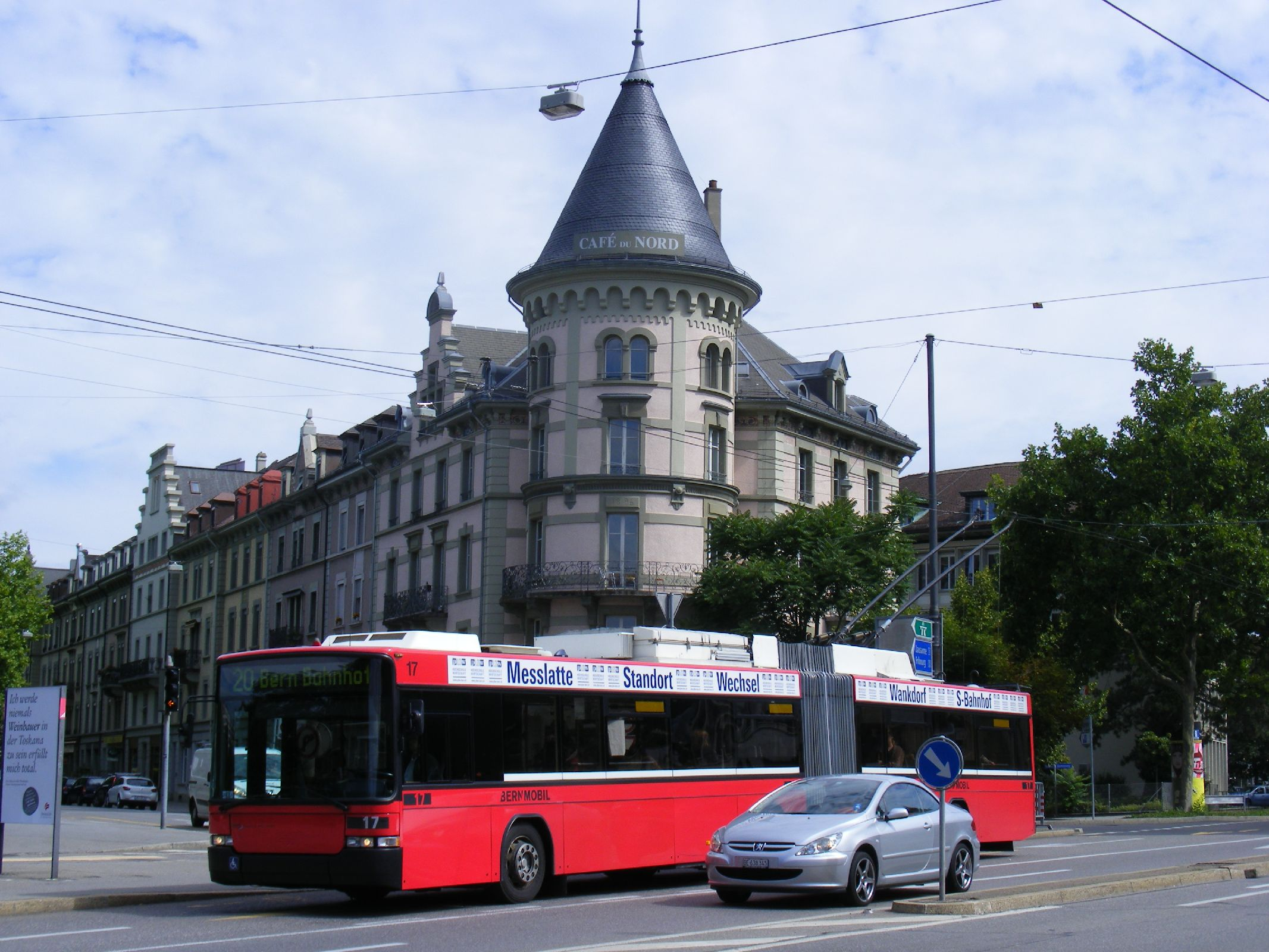 Bernmobil trolleybus nr 17, Linie nr 20 nach Bern Bahnhof.